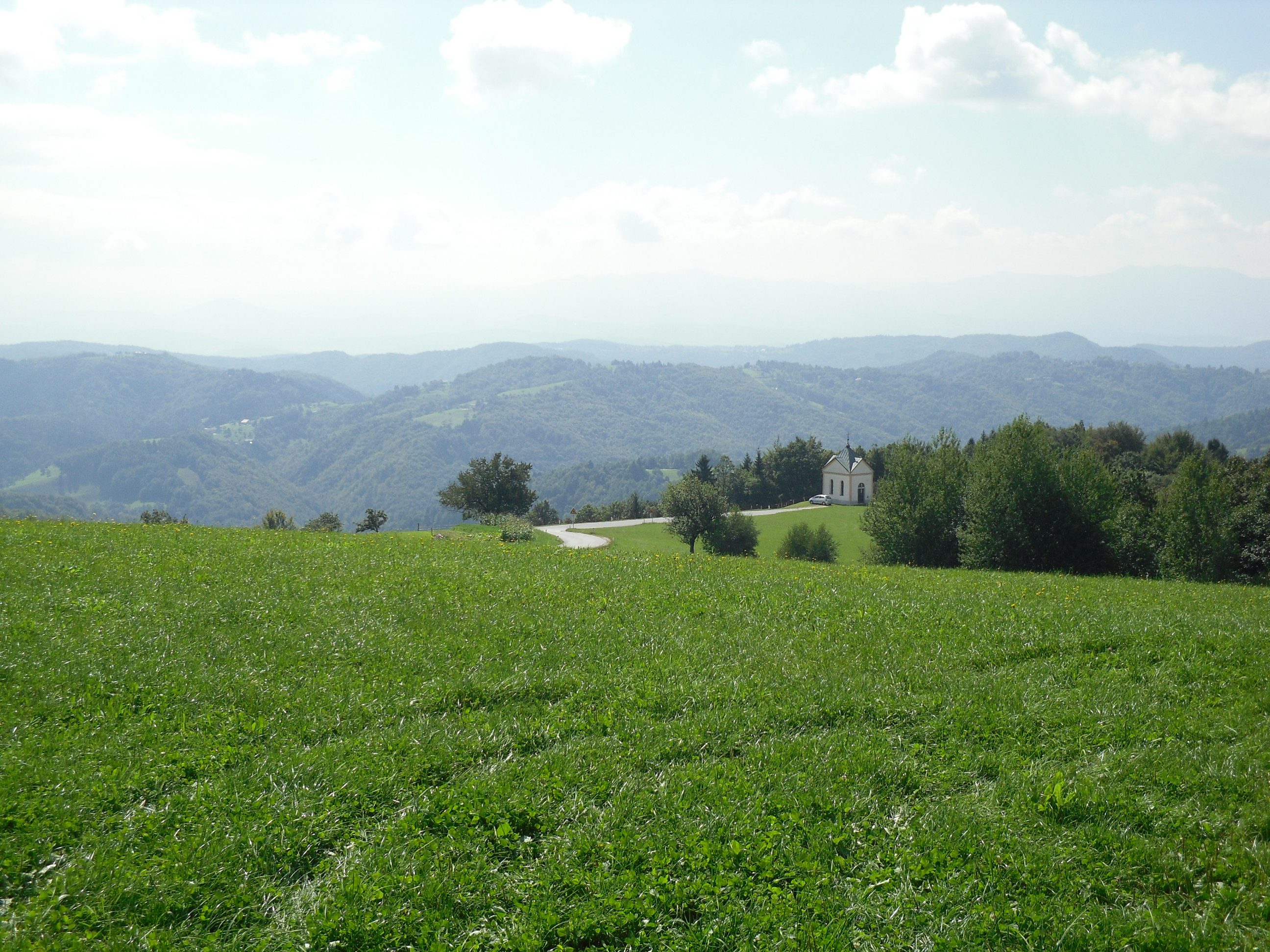 Janče